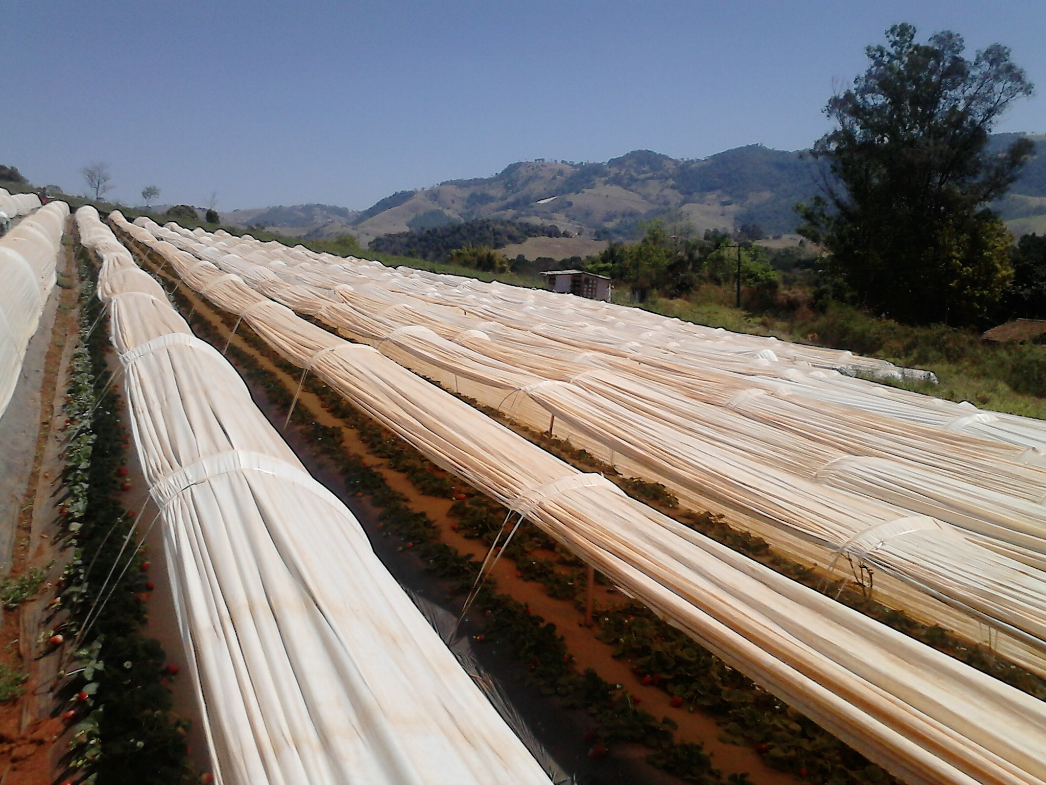 Cultivo de morango no município de Estiva.